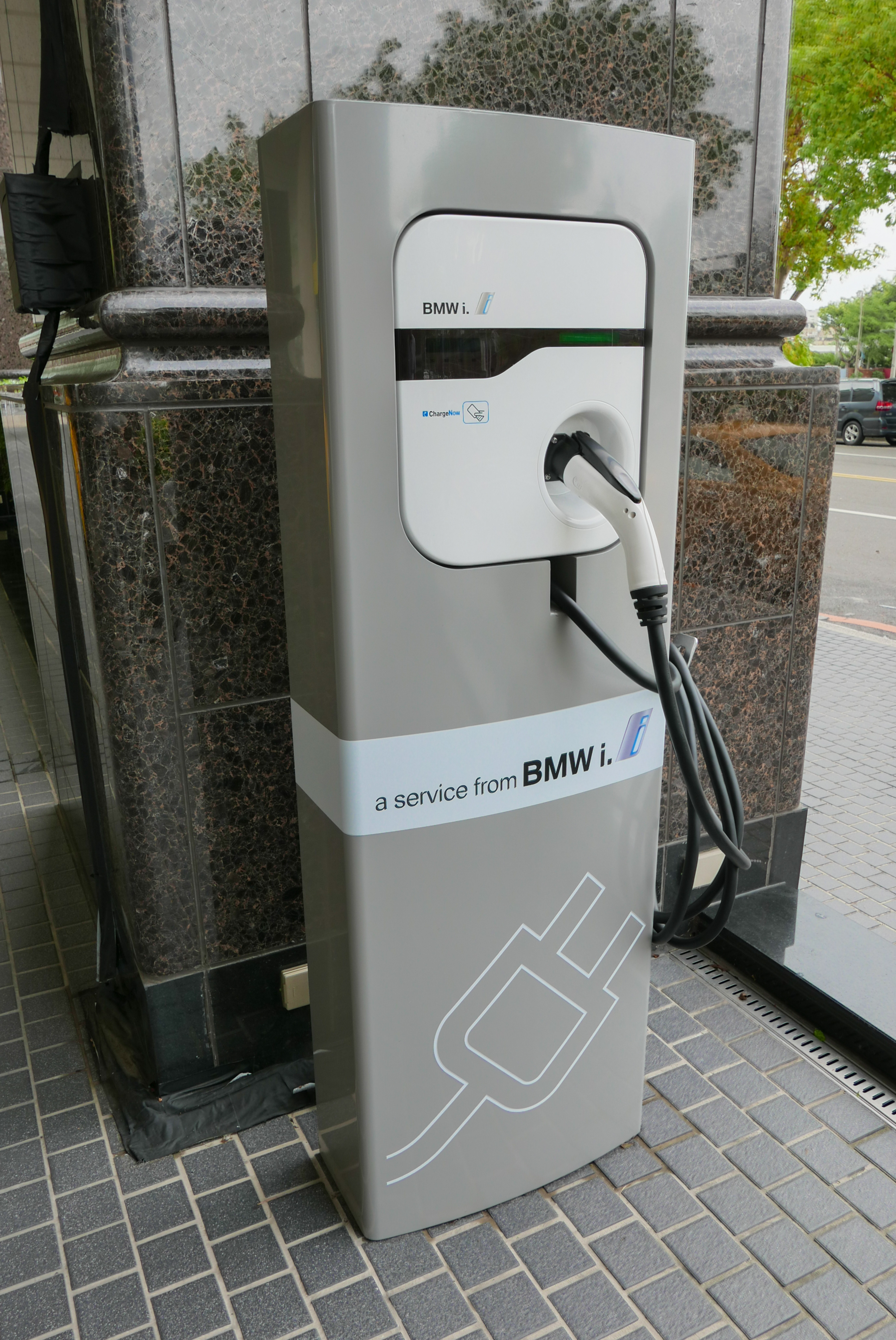 J1772規格の充電器（台湾・台南市・BMW）